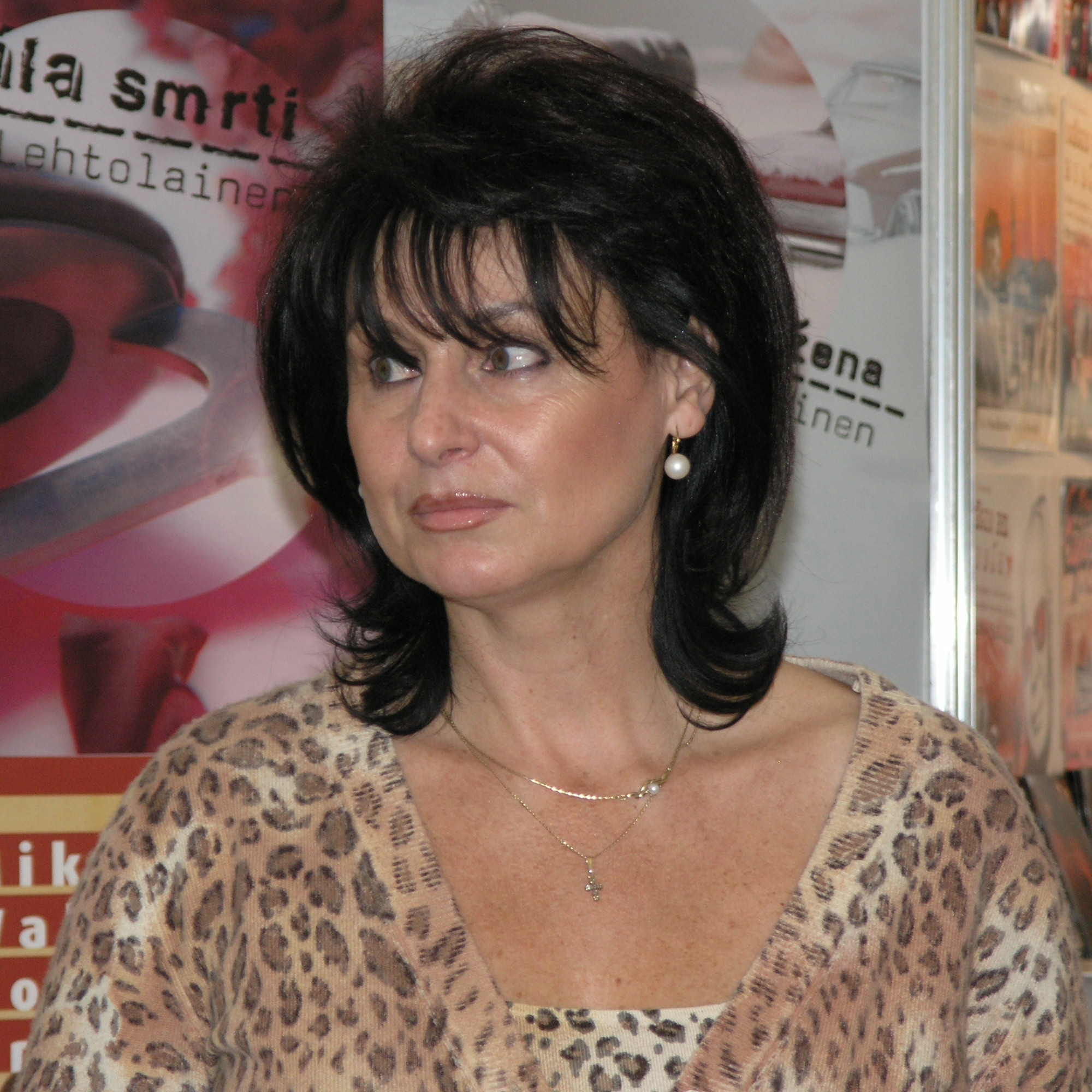 Praha, Svět knihy 2009 - Renata Vesecká